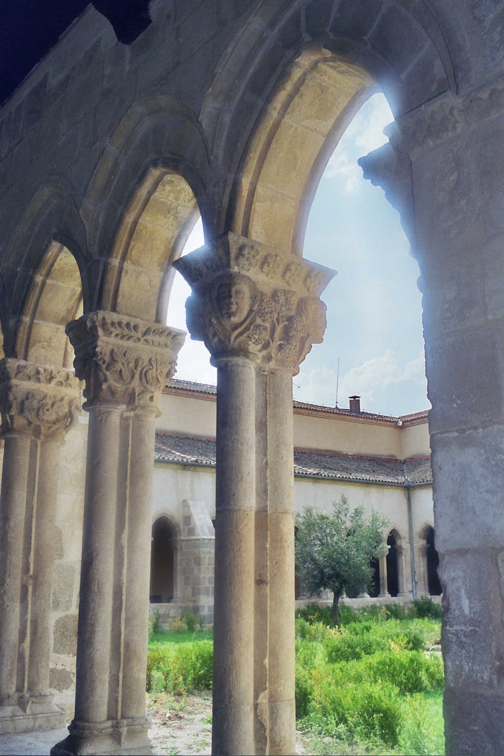 Segovia. (Castilla-León. España) Santa María la Real de Nieva (provincia de Segovia, España). Monasterio construido bajo el patrocinio de Enrique III y Catalina de Lancaster. Fotografía realizada el 23 agosto de 2002 por el autor.User:Pelayo2.